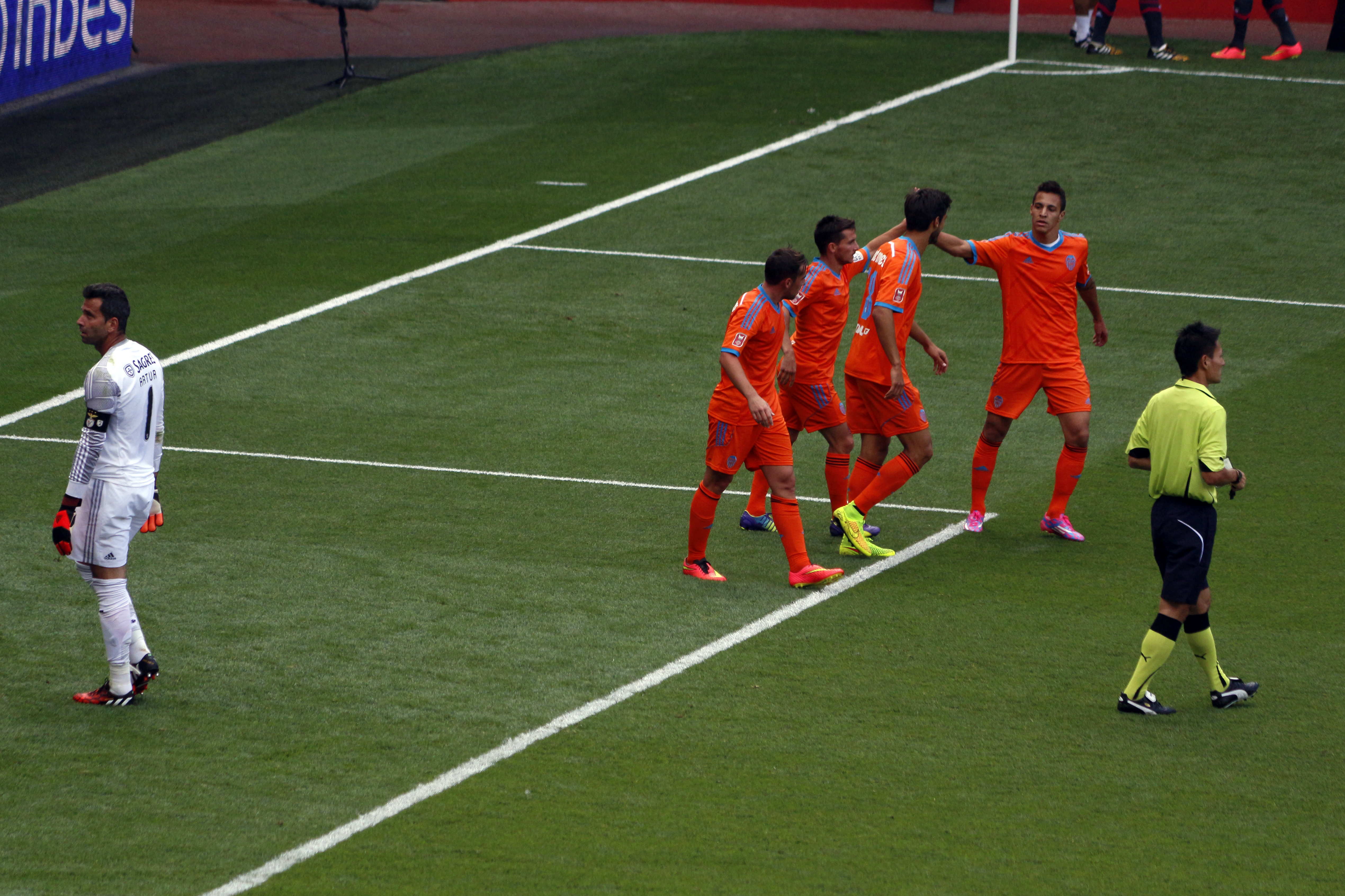 Emirates Cup, 3 d'agost de 2014.